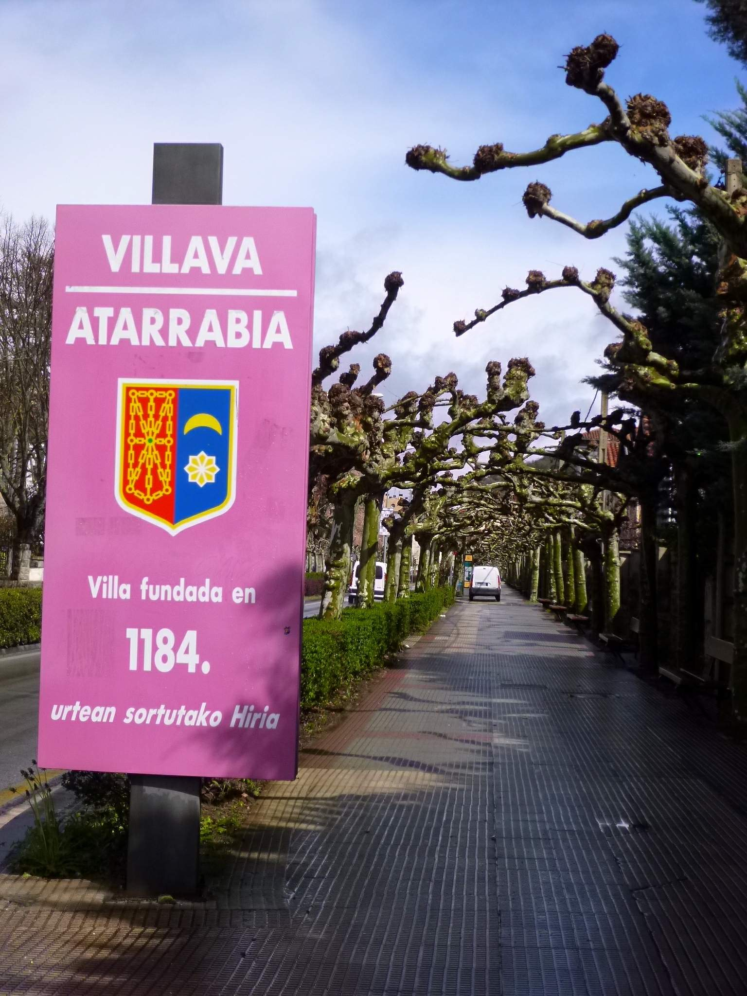 Villava (Navarra)